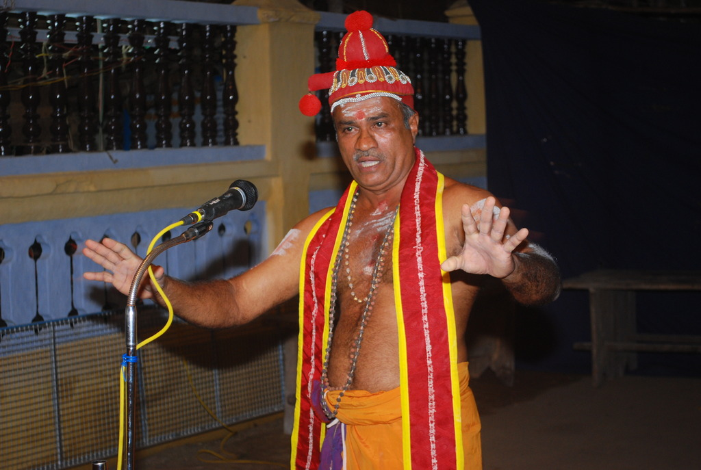 പാഠകം അവതരണം, ഉണിച്ചക്കംവീട് ക്ഷേത്രം, കൊല്ലം